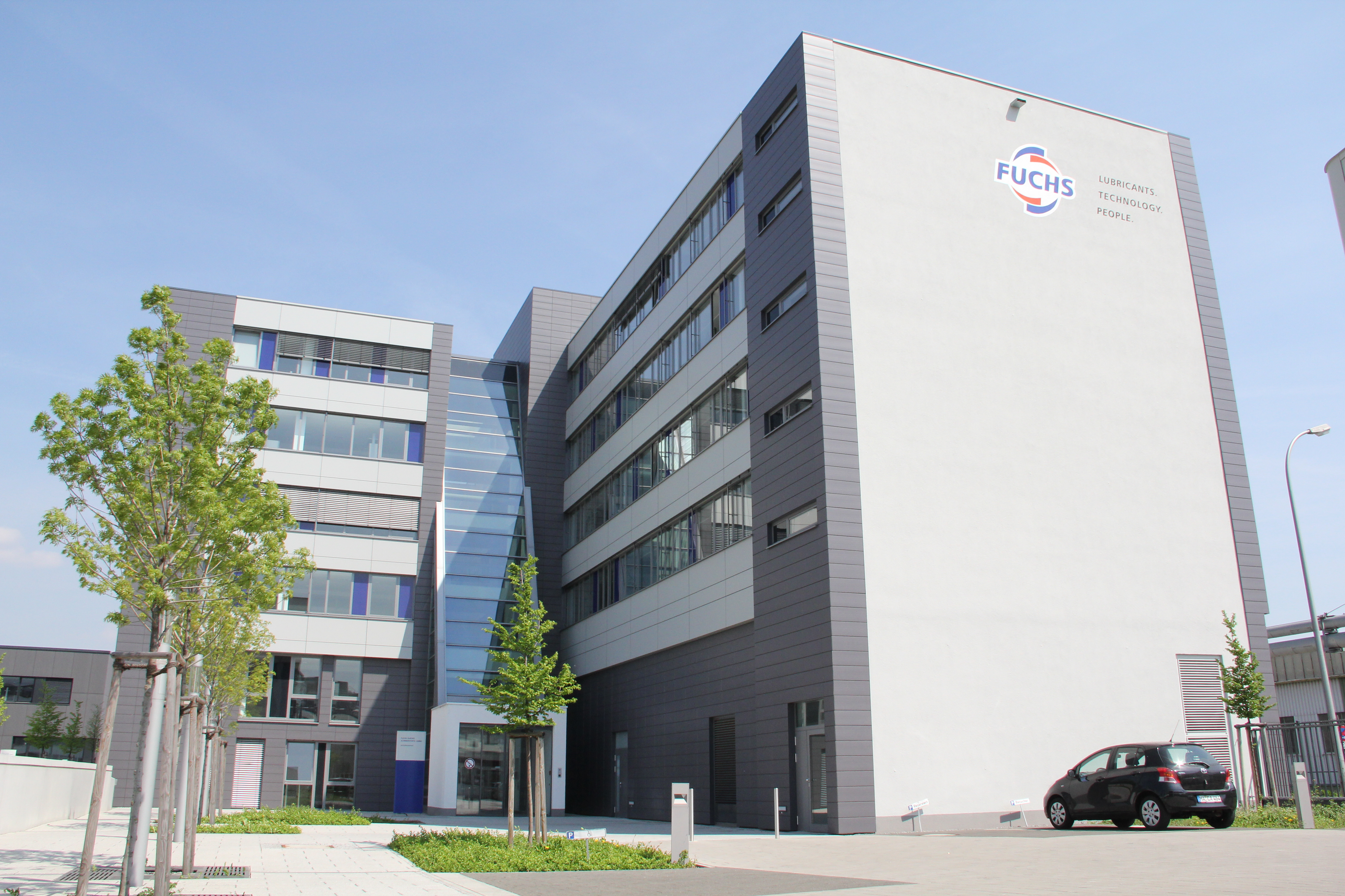 Firmenzentrale in Mannheim